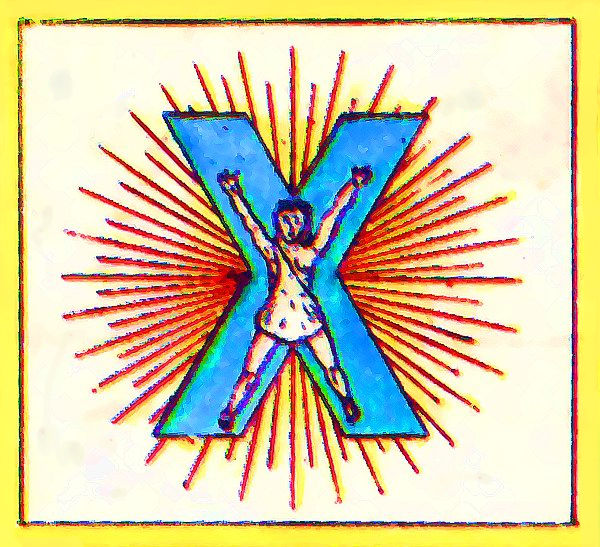 Прапор Охтирського козацького полку